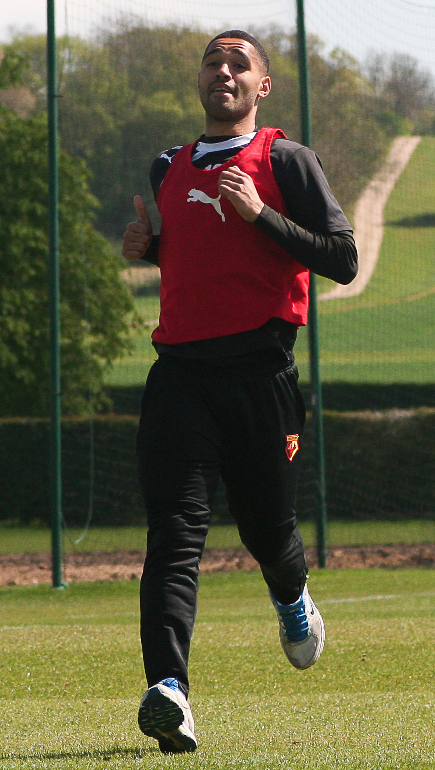 Lewis McGugan